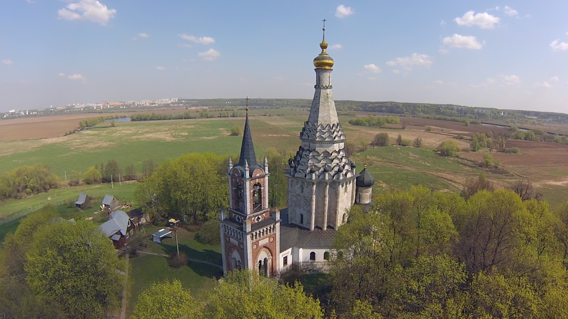 Церковь Преображения Господня (Москва и Московская область, Ленинск, село Остров)